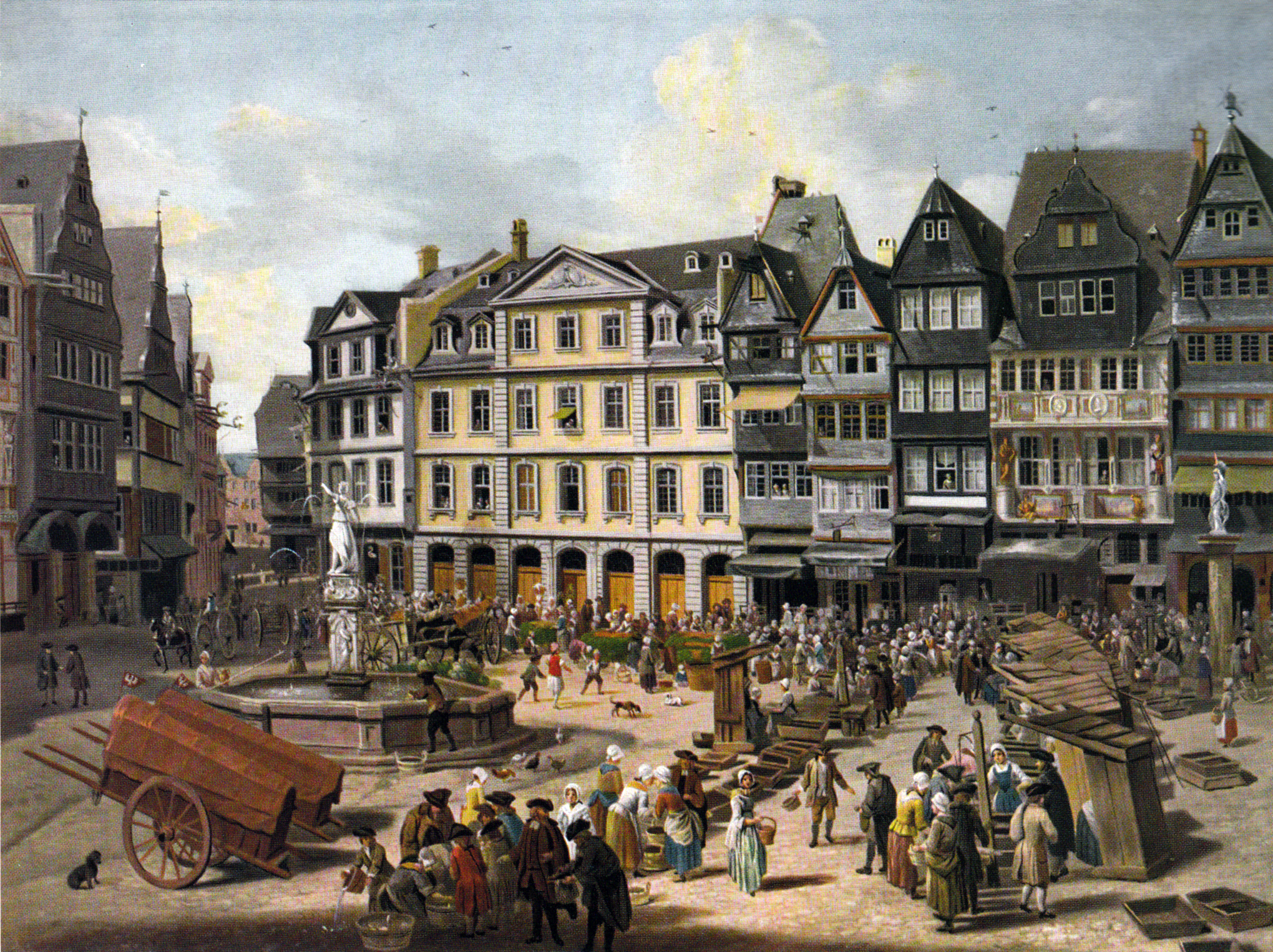 Die Nordseite des Frankfurter Römerbergs 1754